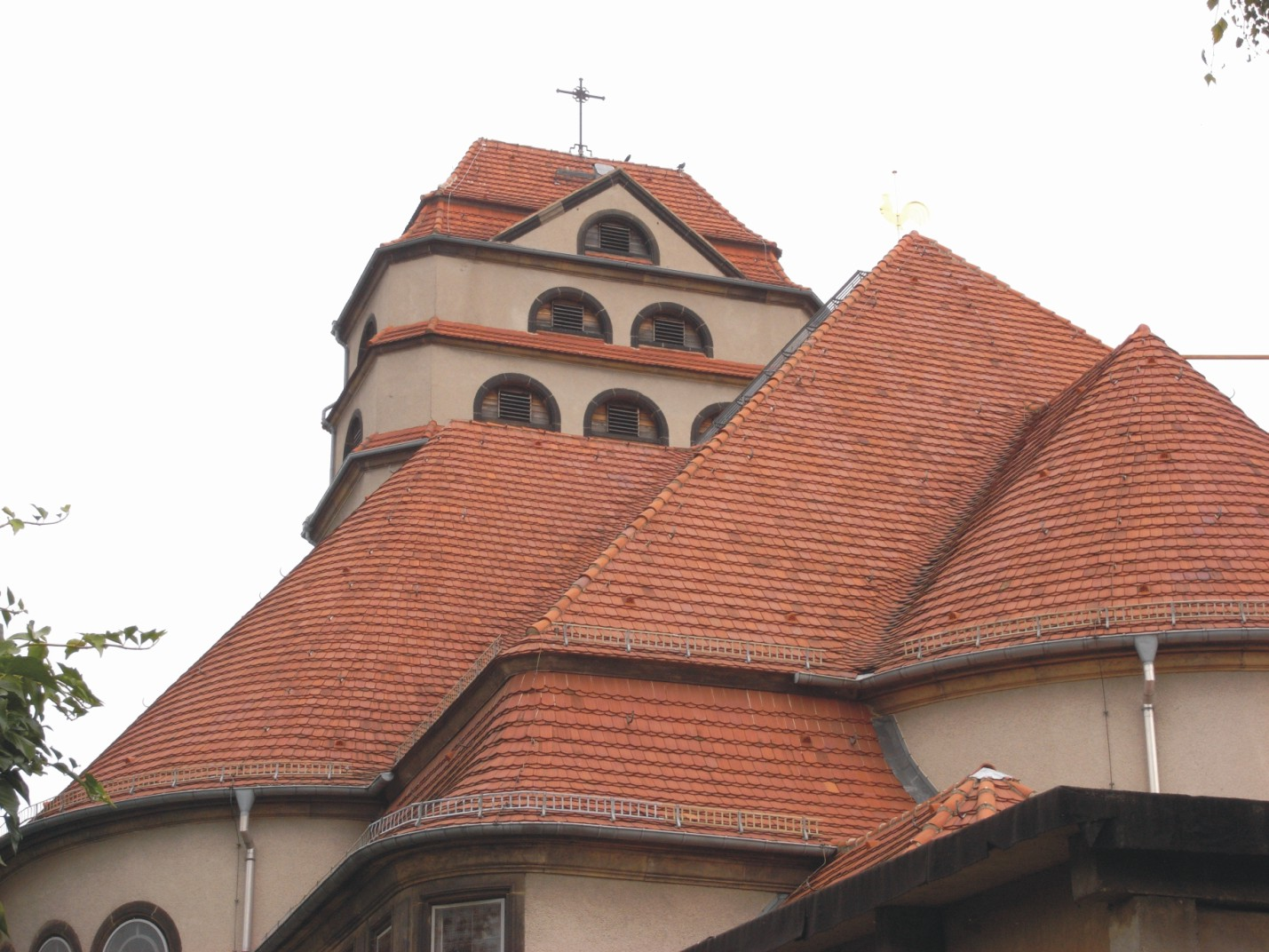 Heilandskirche in Dresden-Cotta (Sachsen, Deutschland)